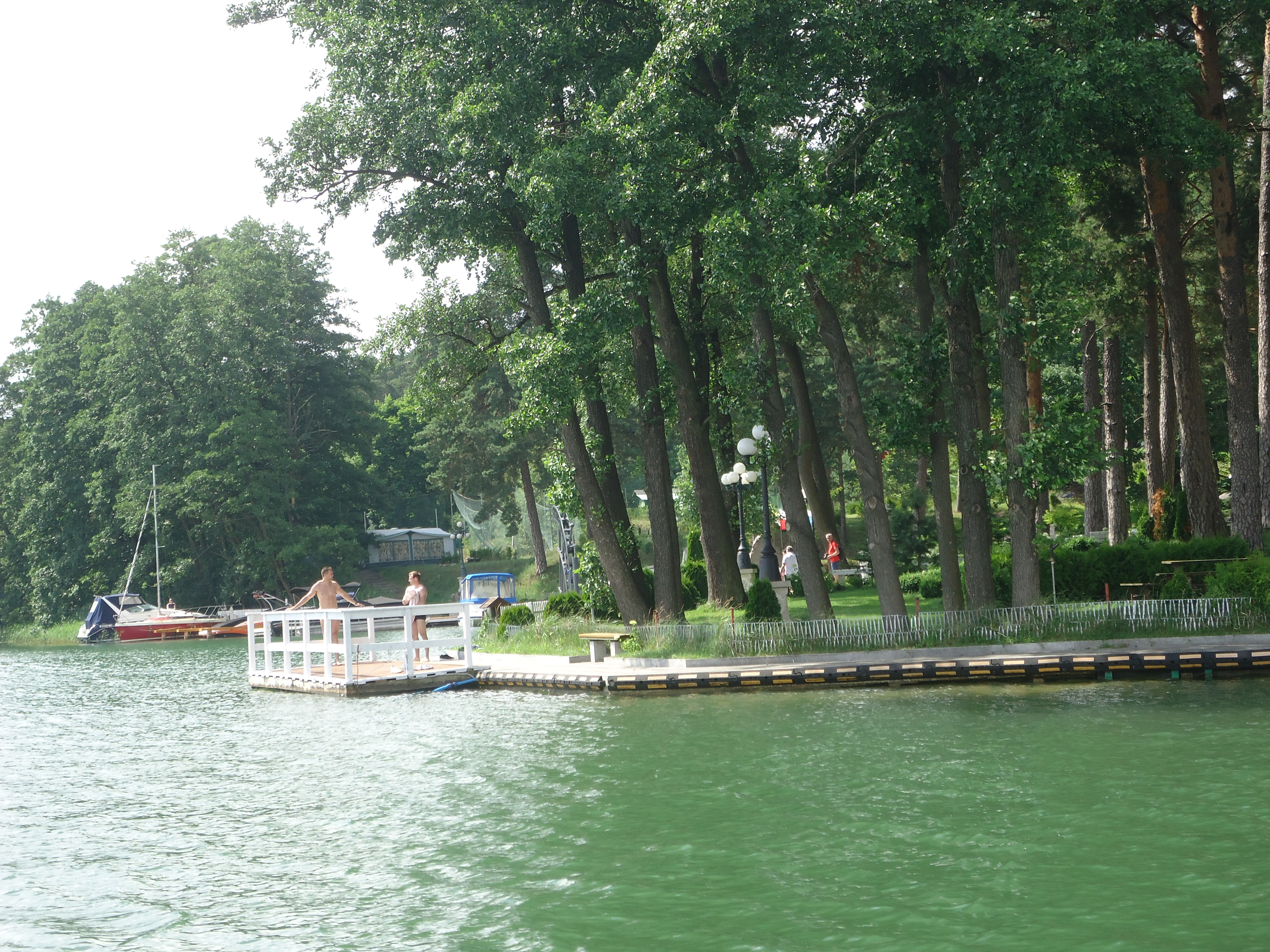 województwo podlaskie, Kanał Augustowski Wikidata has entry Q770907 with data related to this item.